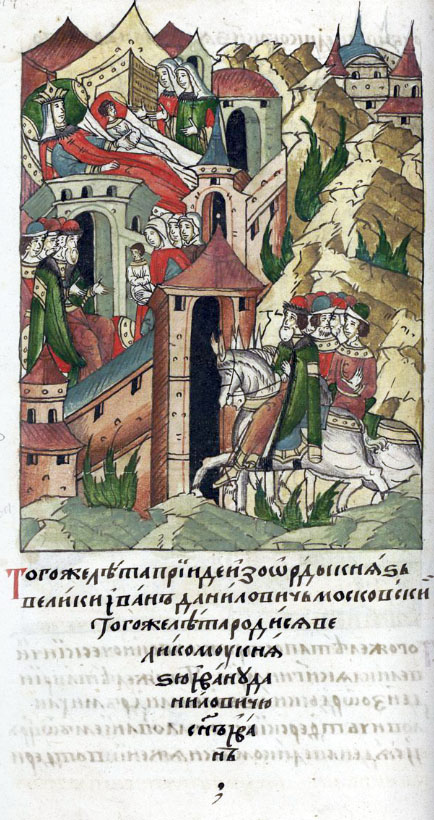 ЛИЦЕВОЙ ЛЕТОПИСНЫЙ СВОД В том году пришел из Орды великий князь Иван Данилович Московский. В том году родился у великого князя Ивана Даниловича сын Иван.